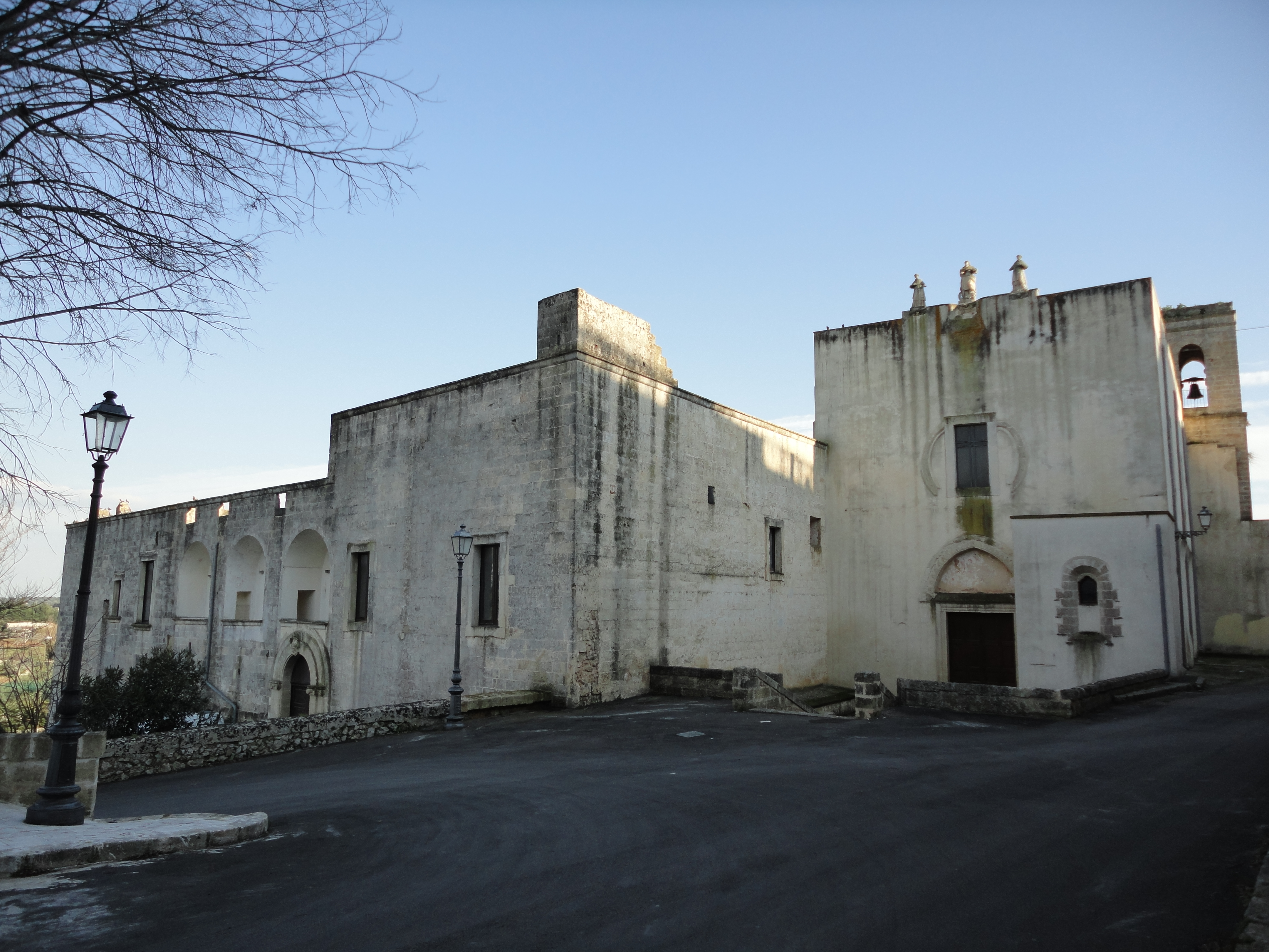 Chiesa e Convento Francescani Neri Specchia, Lecce